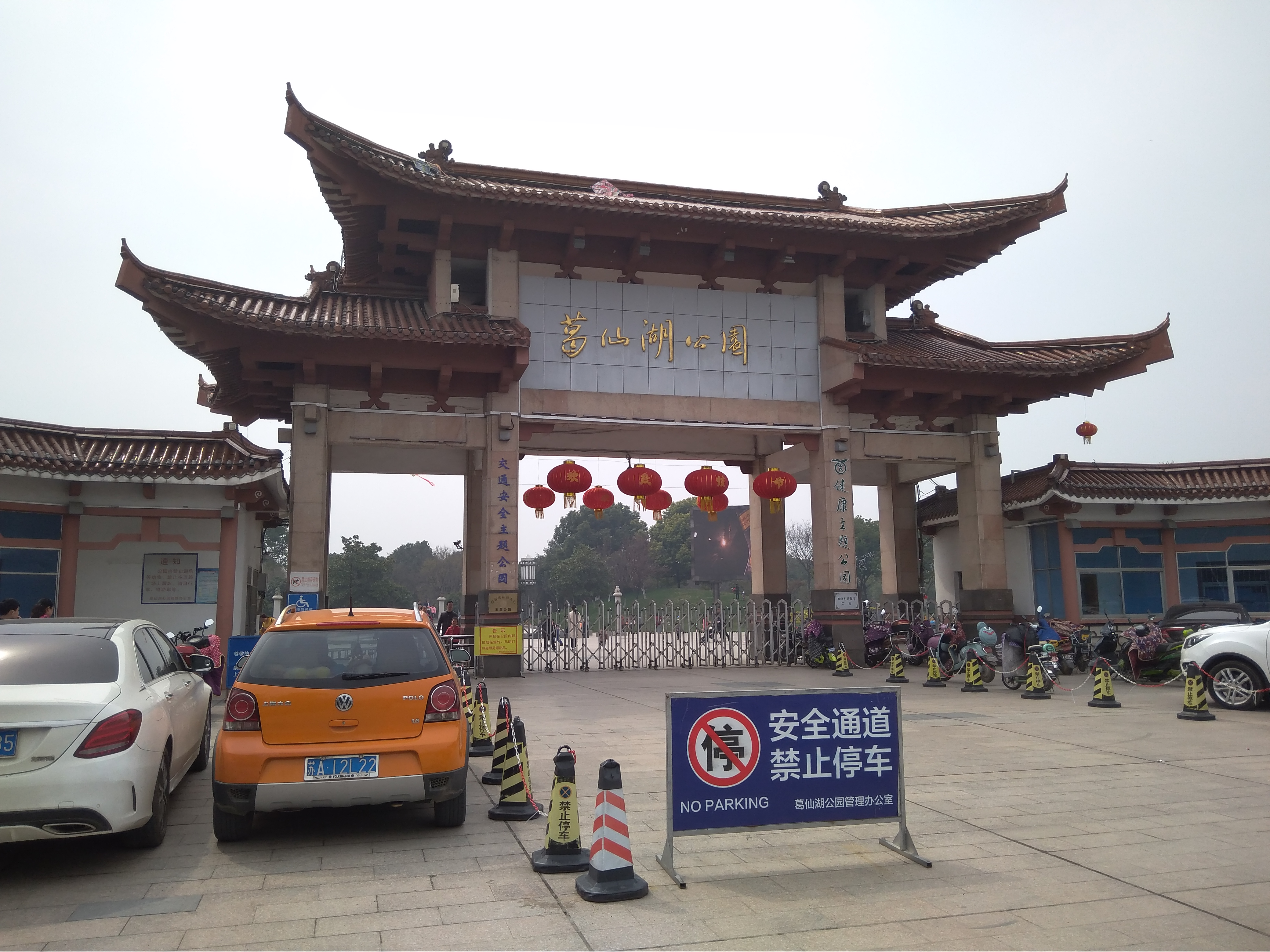 句容市葛仙湖公园